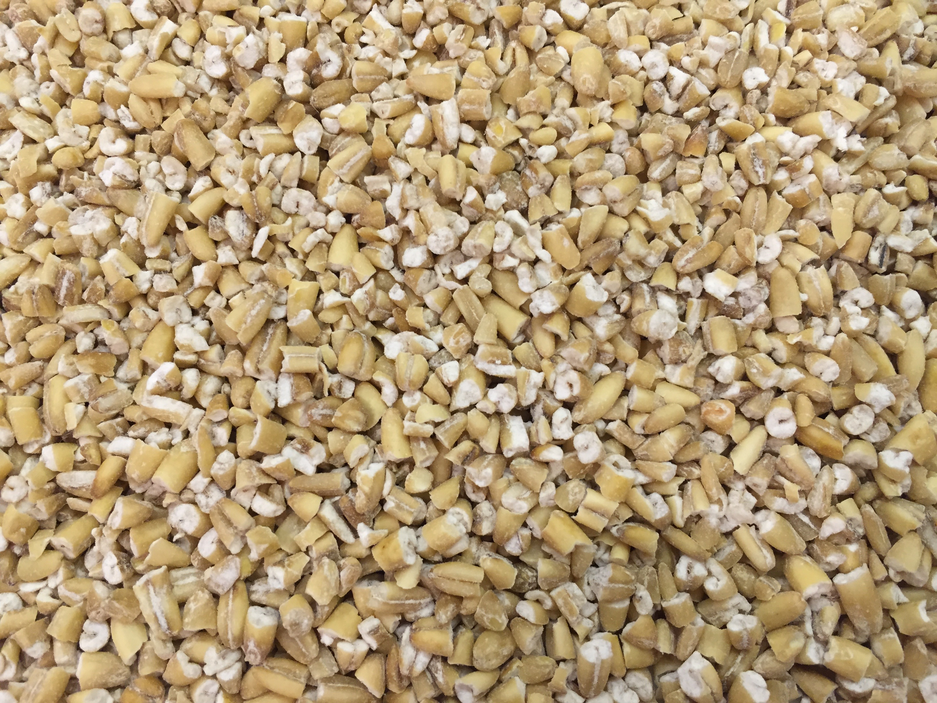 גרעיני שיבולת שועל מלאה שנחתכו בעזרת פלדה